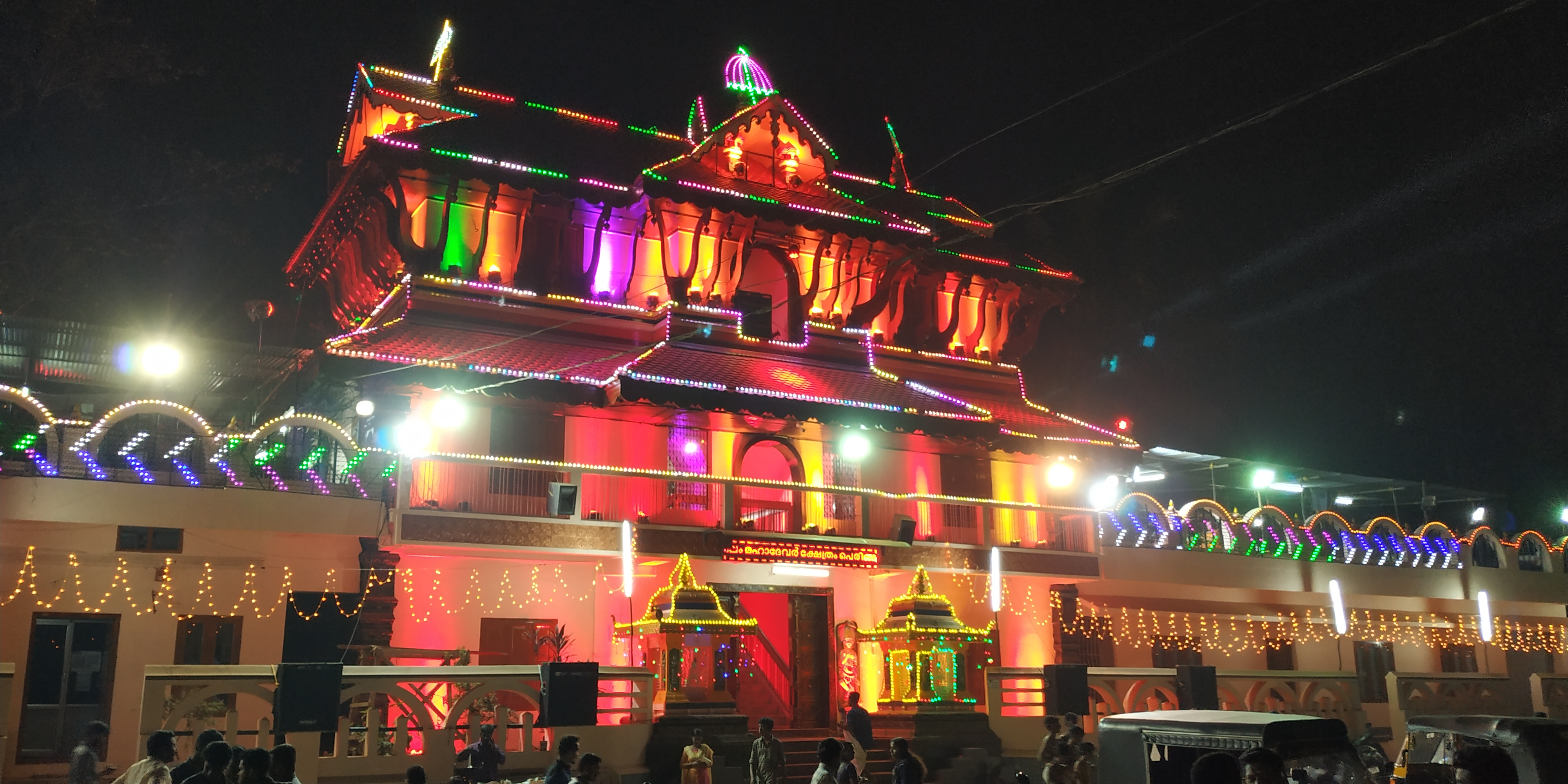 പെരിങ്ങനാട് മഹാദേവ ക്ഷേത്രം